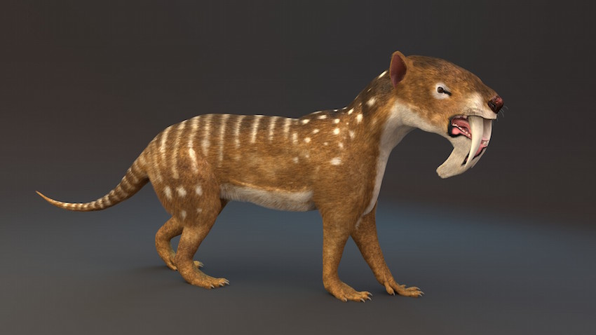 3D Model of Thylacosmilus